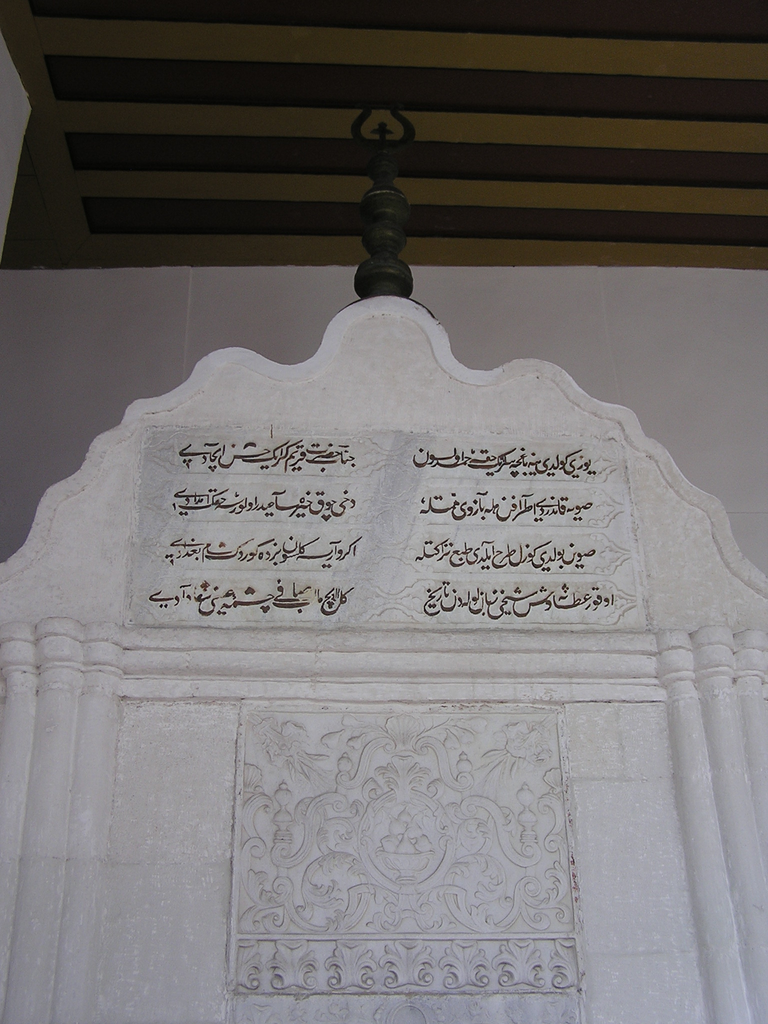 Бахчисарайский дворец